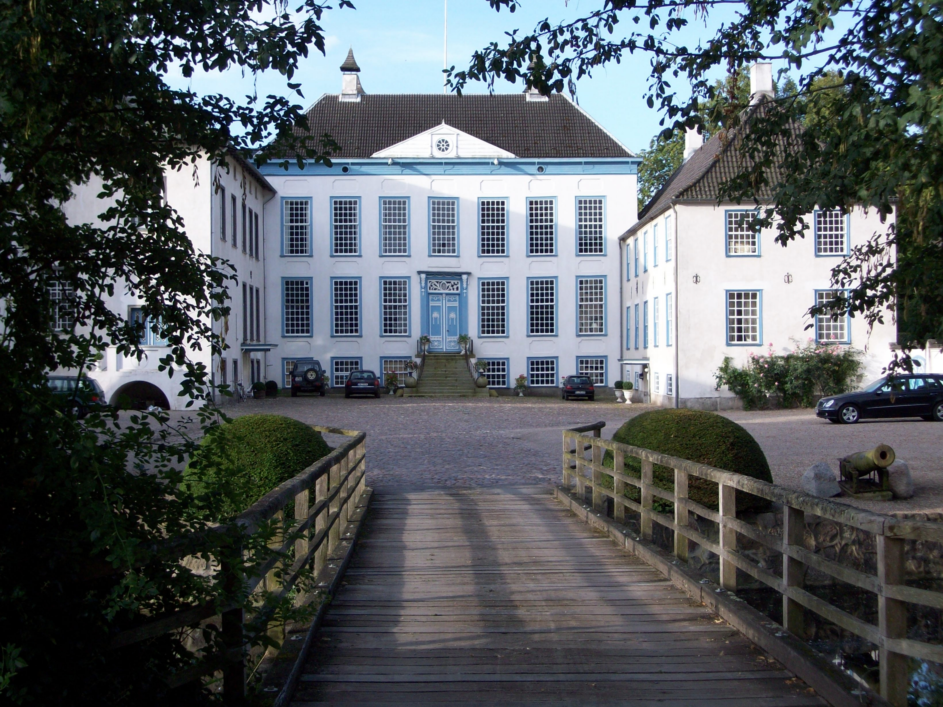 Wasserschloß Gelting, Angelner Land, Schleswig-Holstein